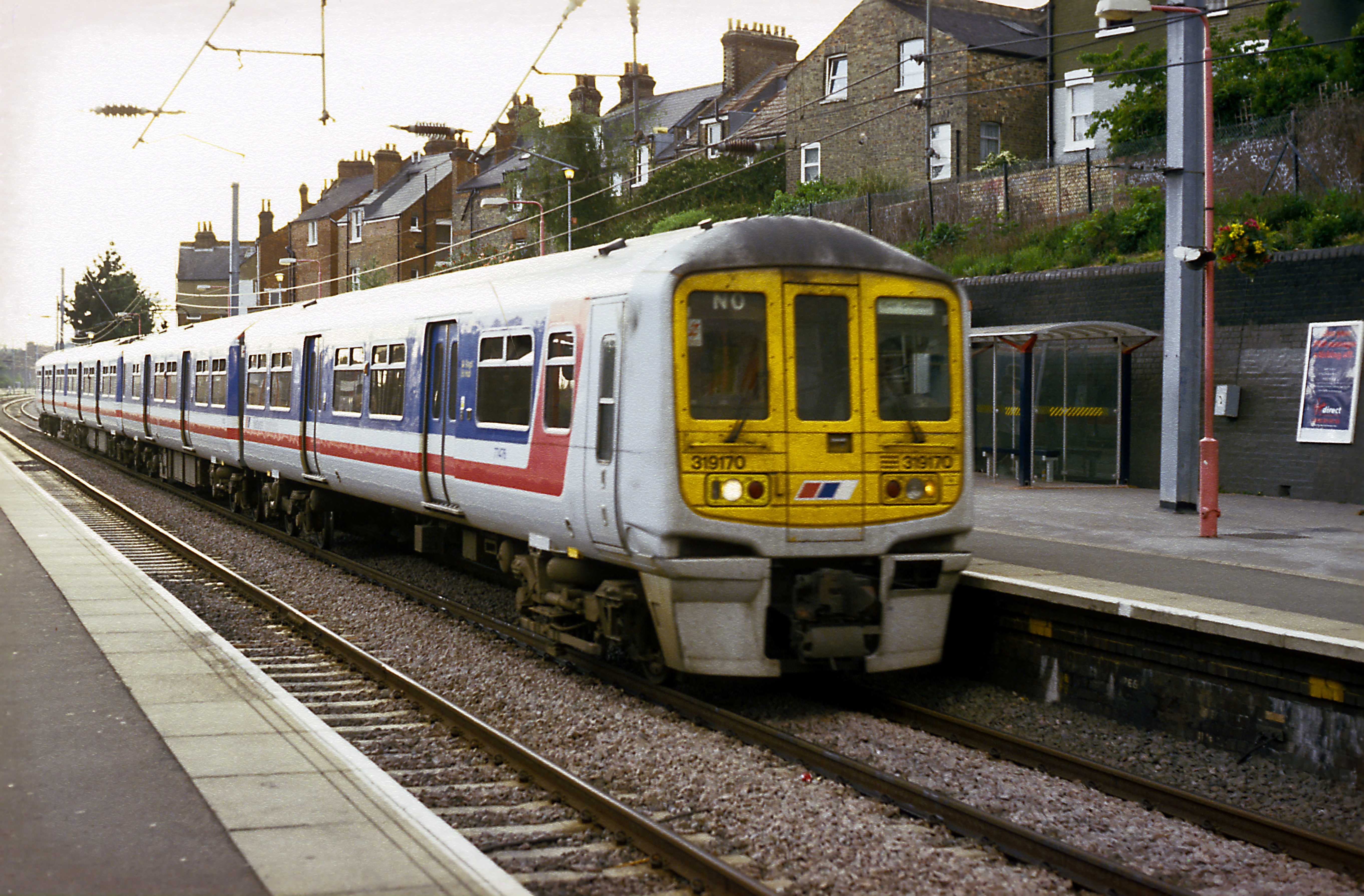 »Thameslink«-Zweisystemtriebzug Richtung Süden noch im klassischen Network-Southeast-Anstrich